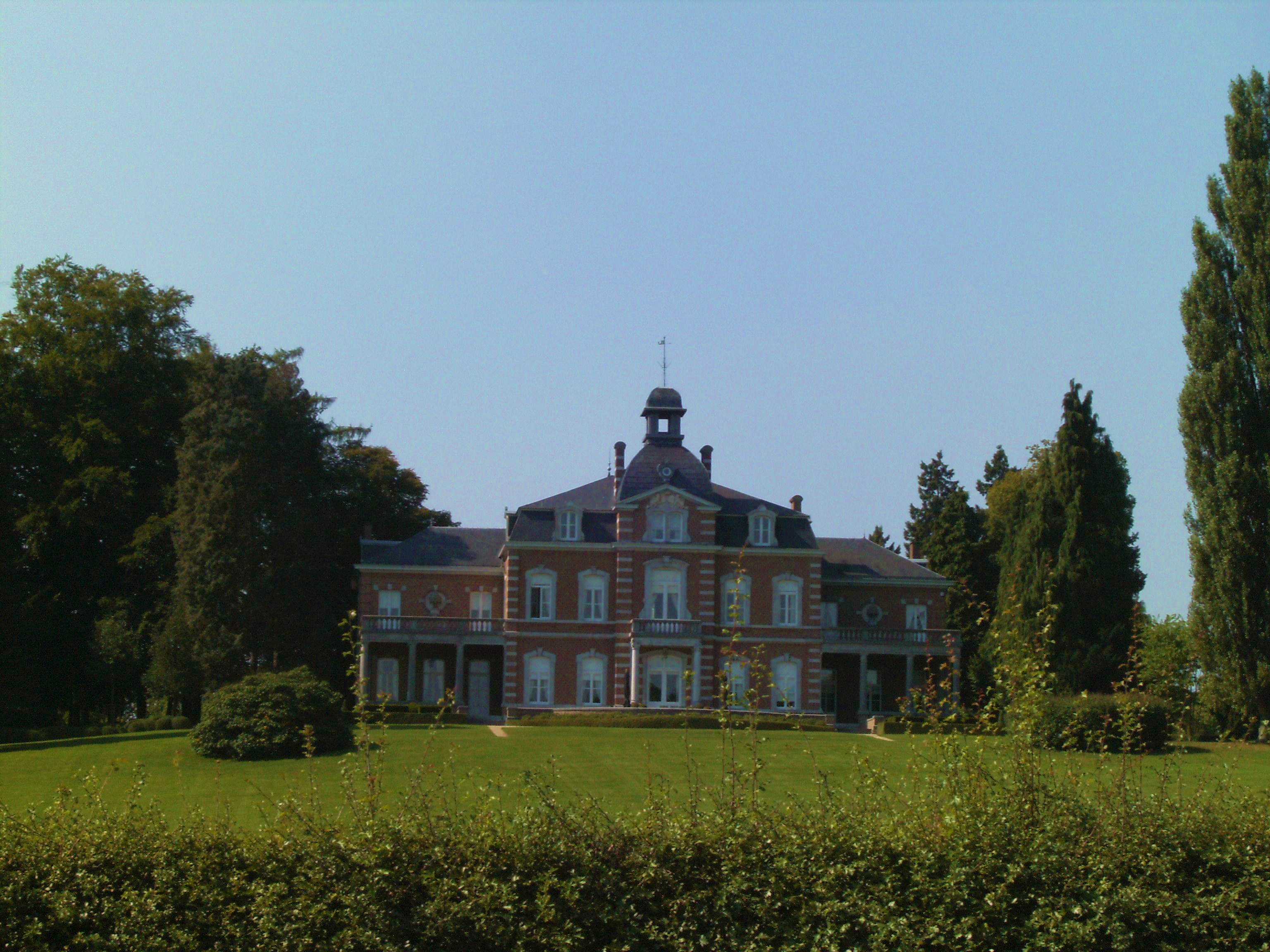 Kasteel van Kolmont te Overrepen